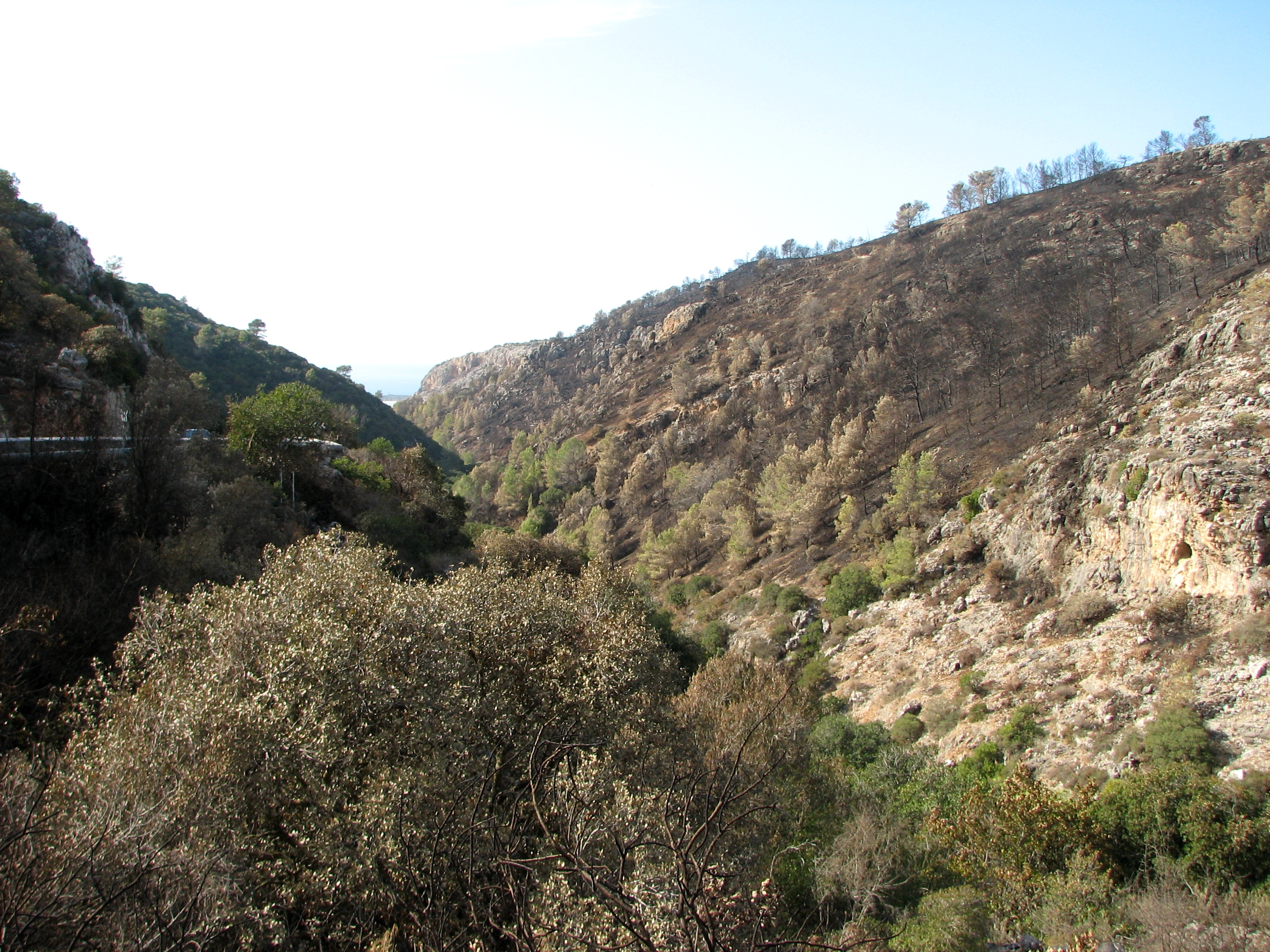 Oren Wadi - Mount Carmel Israel, after 2010 fire נחל אורן לאחר השריפה בכרמל בחודש דצמבר 2010 טירת כרמל היא עיר במחוז חיפה בישראל ממוקמת במורדות המערביים של הר הכרמל בין שכונת דניה בחיפה לכפר גלים, בסמוך לכביש 4, הכביש הישן מחיפה לתל אביב. צילום לכוון מערב, הצלע הימנית של הנחל נפגעה קשה בשריפה. צולם מעיקול הנחל במקום בו ניתן לראות ריכוז של צנירים